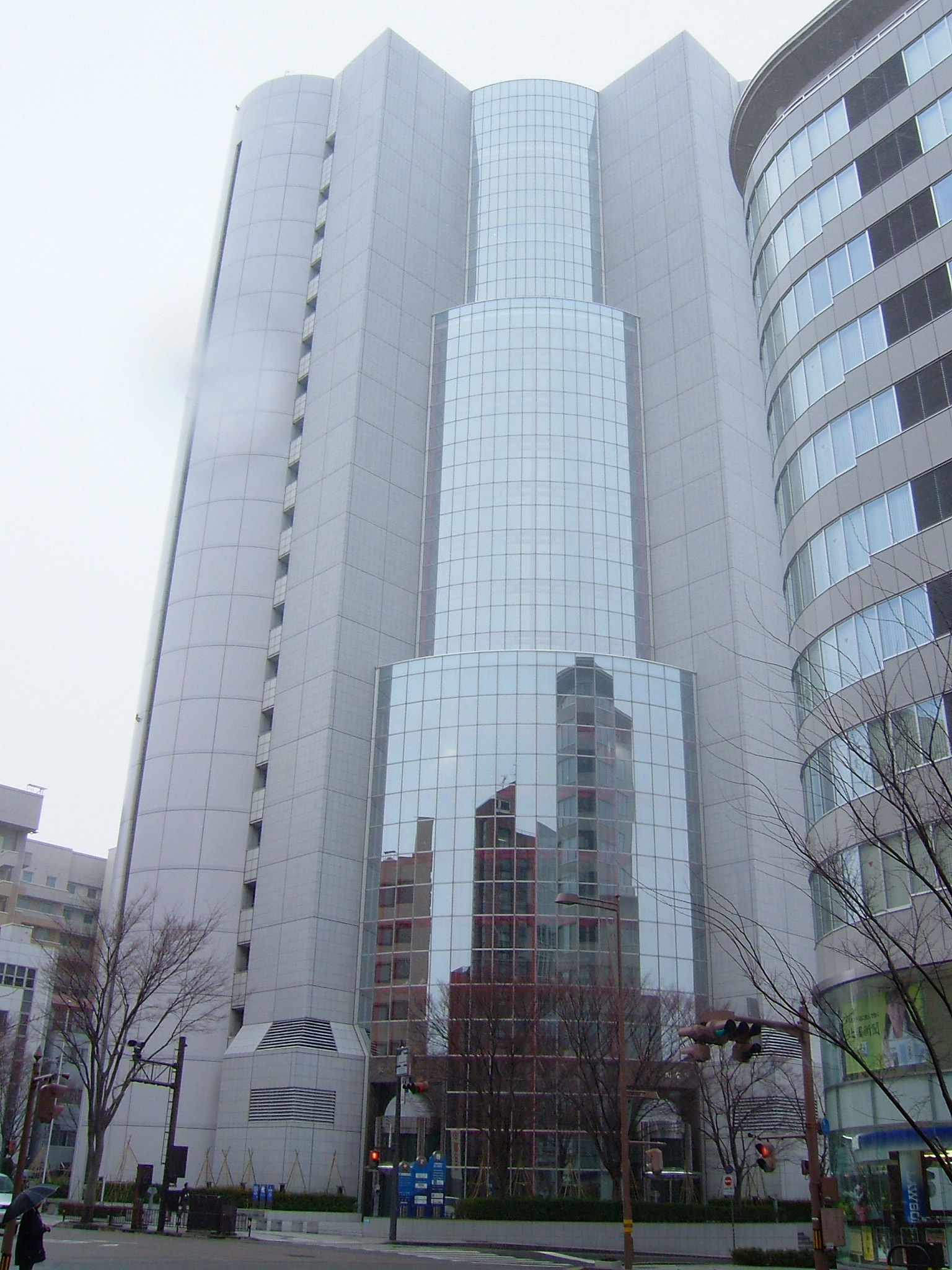 北國新聞社の本社ビル「北國新聞会館」